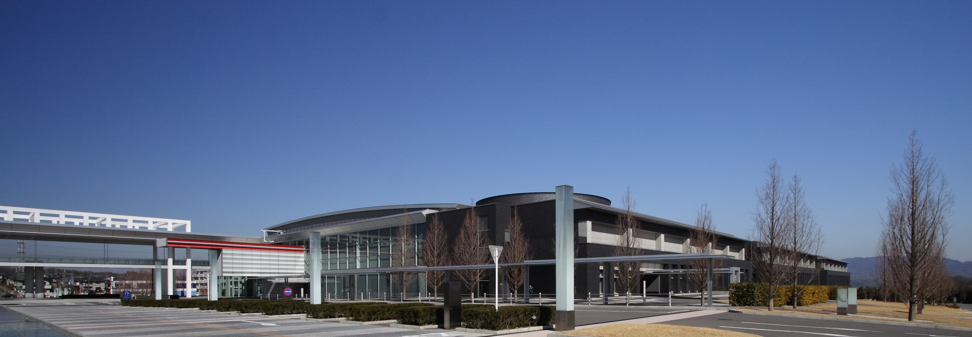 Watashino Shigotokan (Kyoto, Japan)